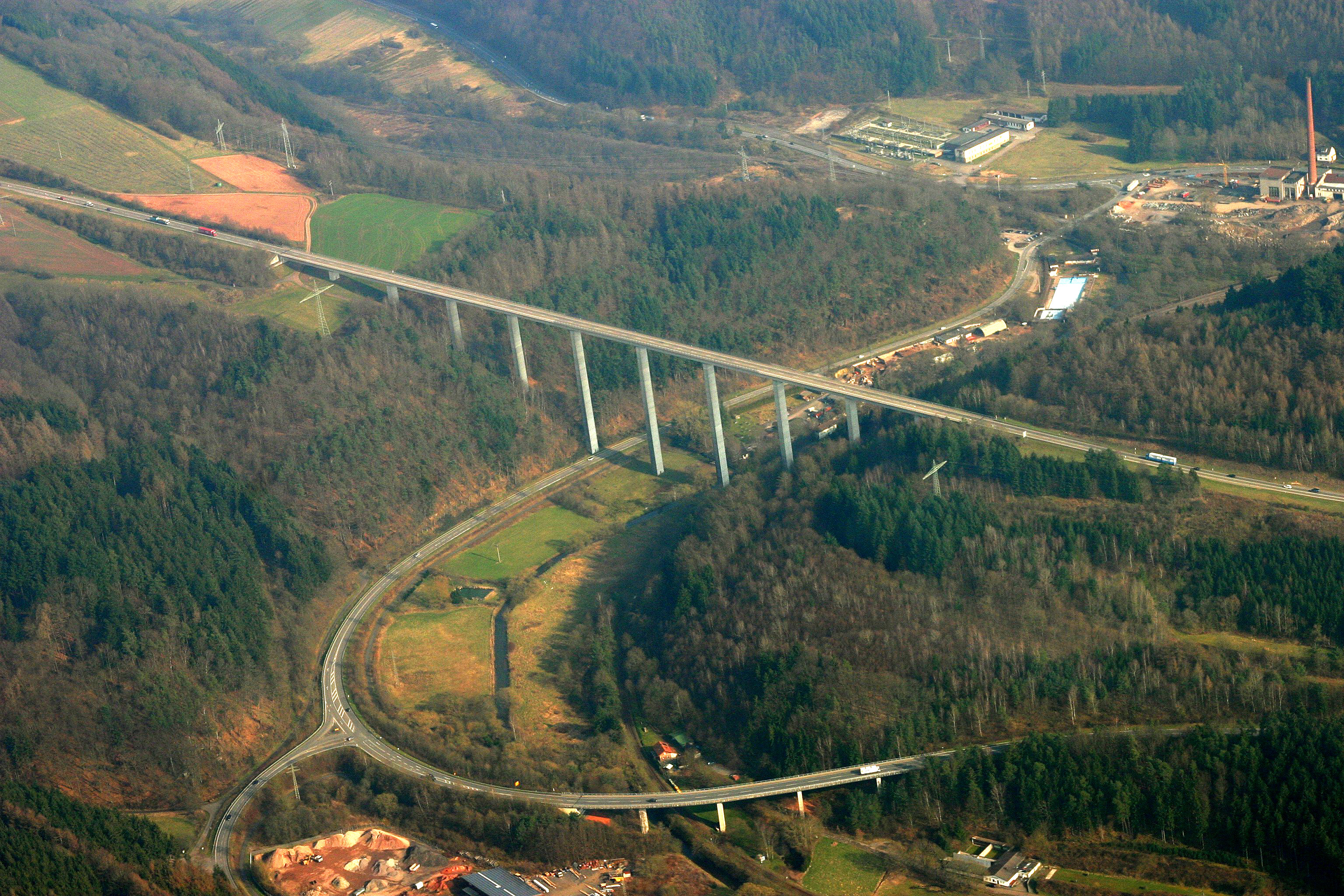 Luftaufnahme der Schwarzbachtalbrücke (A 62)